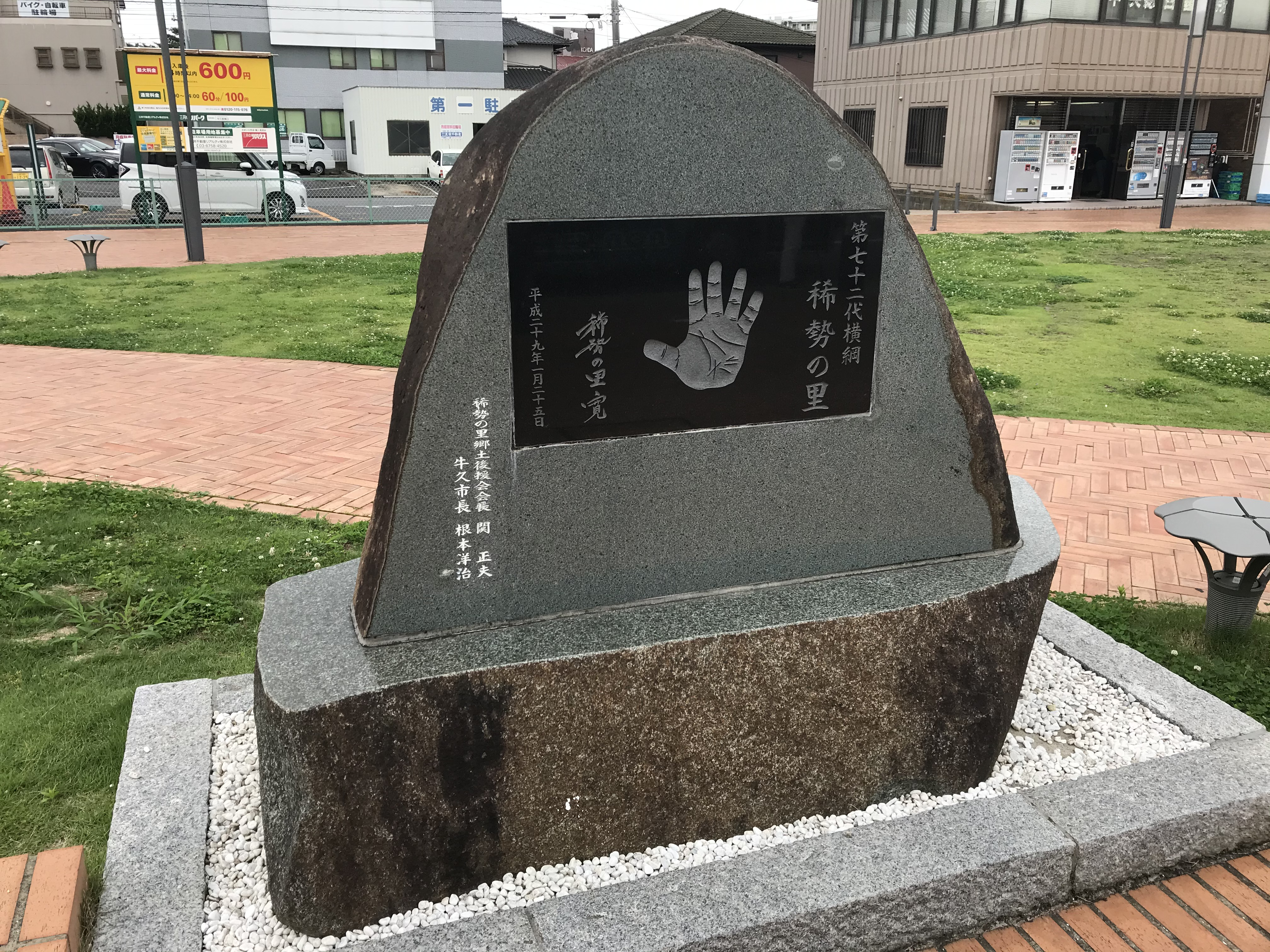 稀勢の里の手形